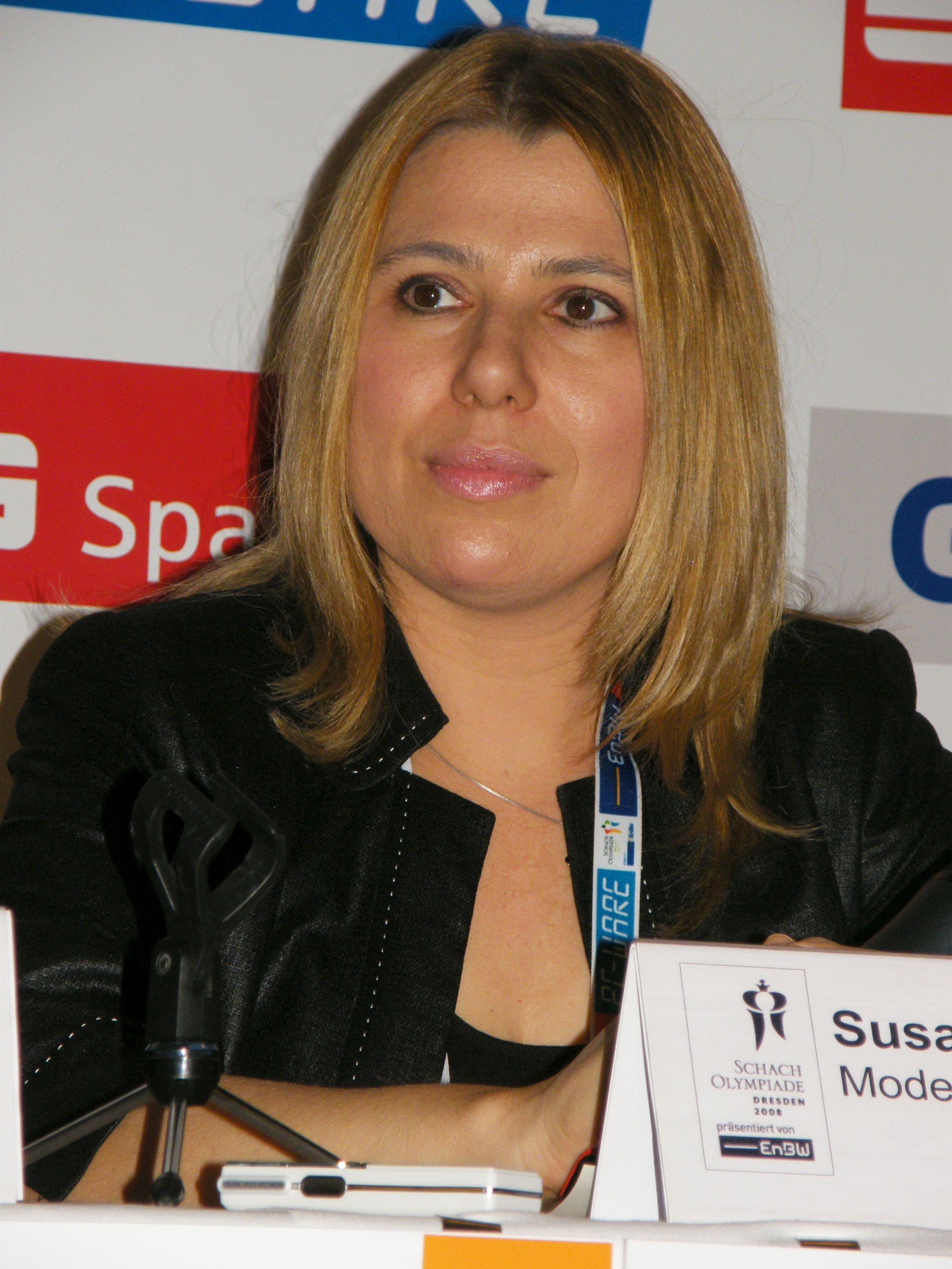 Susan Polgar als Moderatorin bei einer Pressekonferenz der 38. Schacholympiade in Dresden 2008